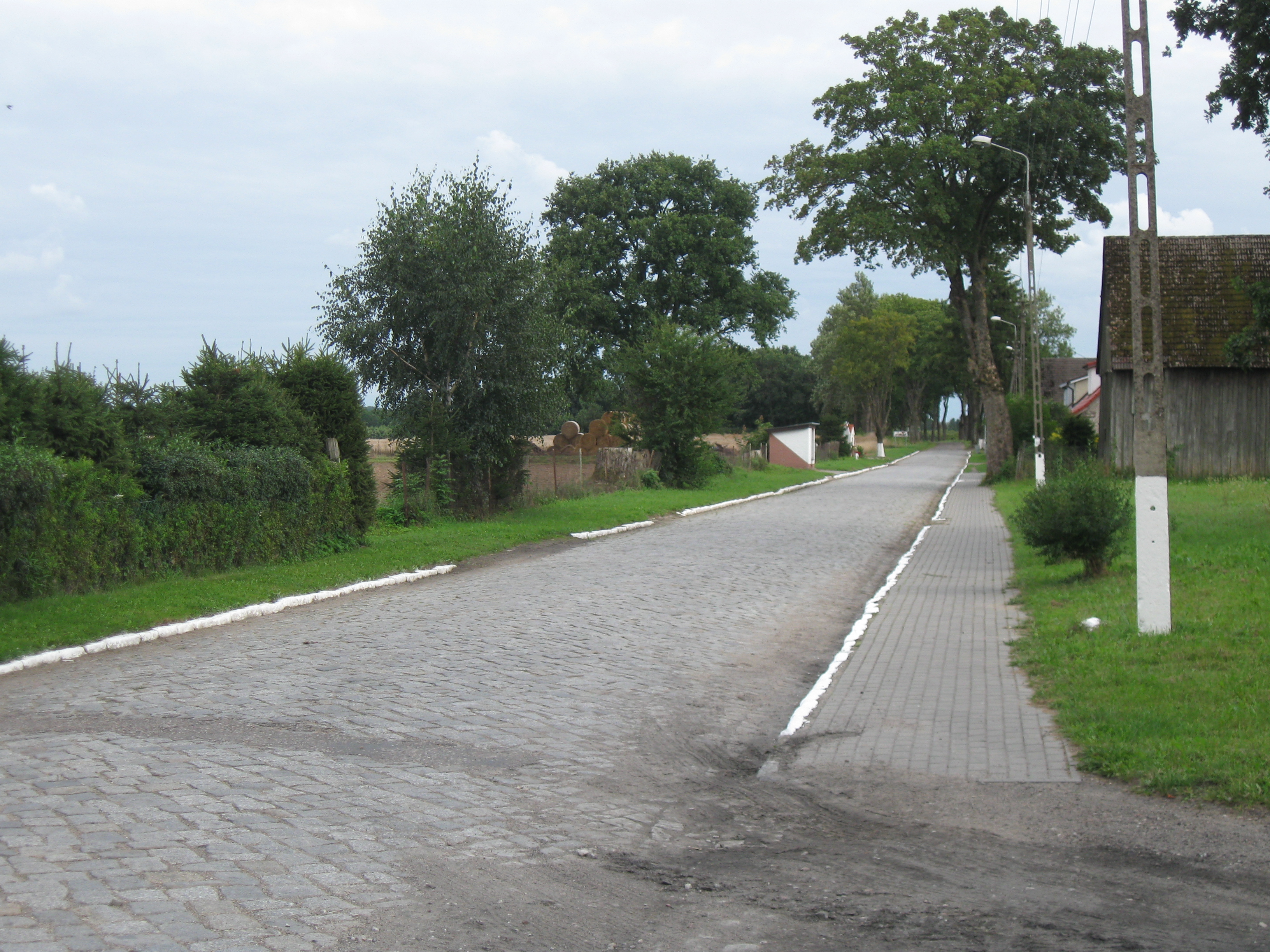 Kinowo - centrum wsi